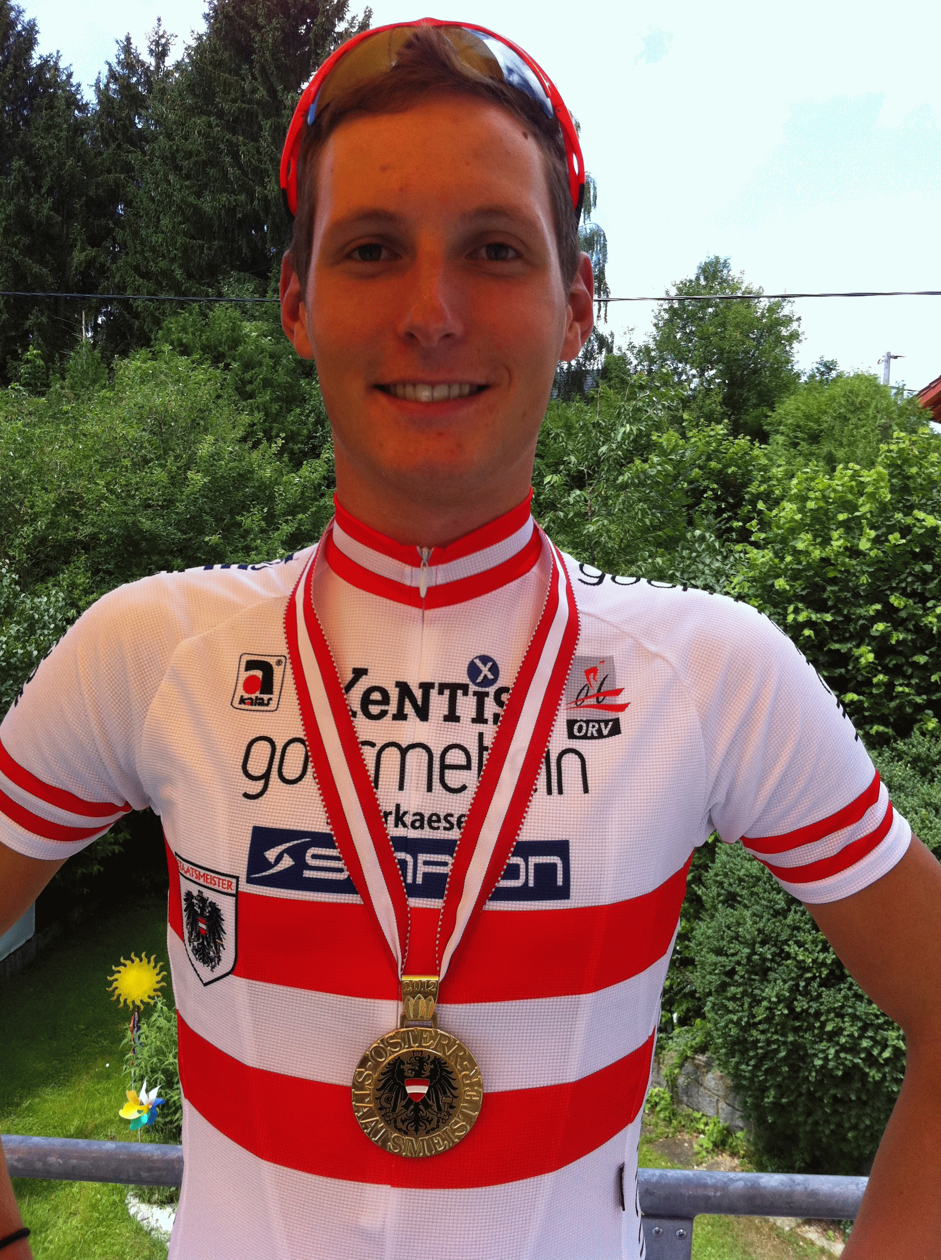 Lukas Pöstlberger im Staatsmeistertrikot 2012